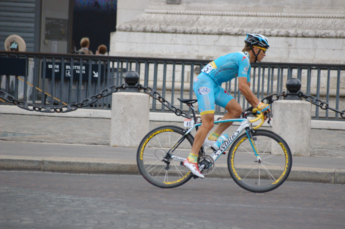 21è étape du Tour de France 2014, Evry-Paris Champs Elysées, photo prise à Paris au pied de l'Arc de Triomphe.